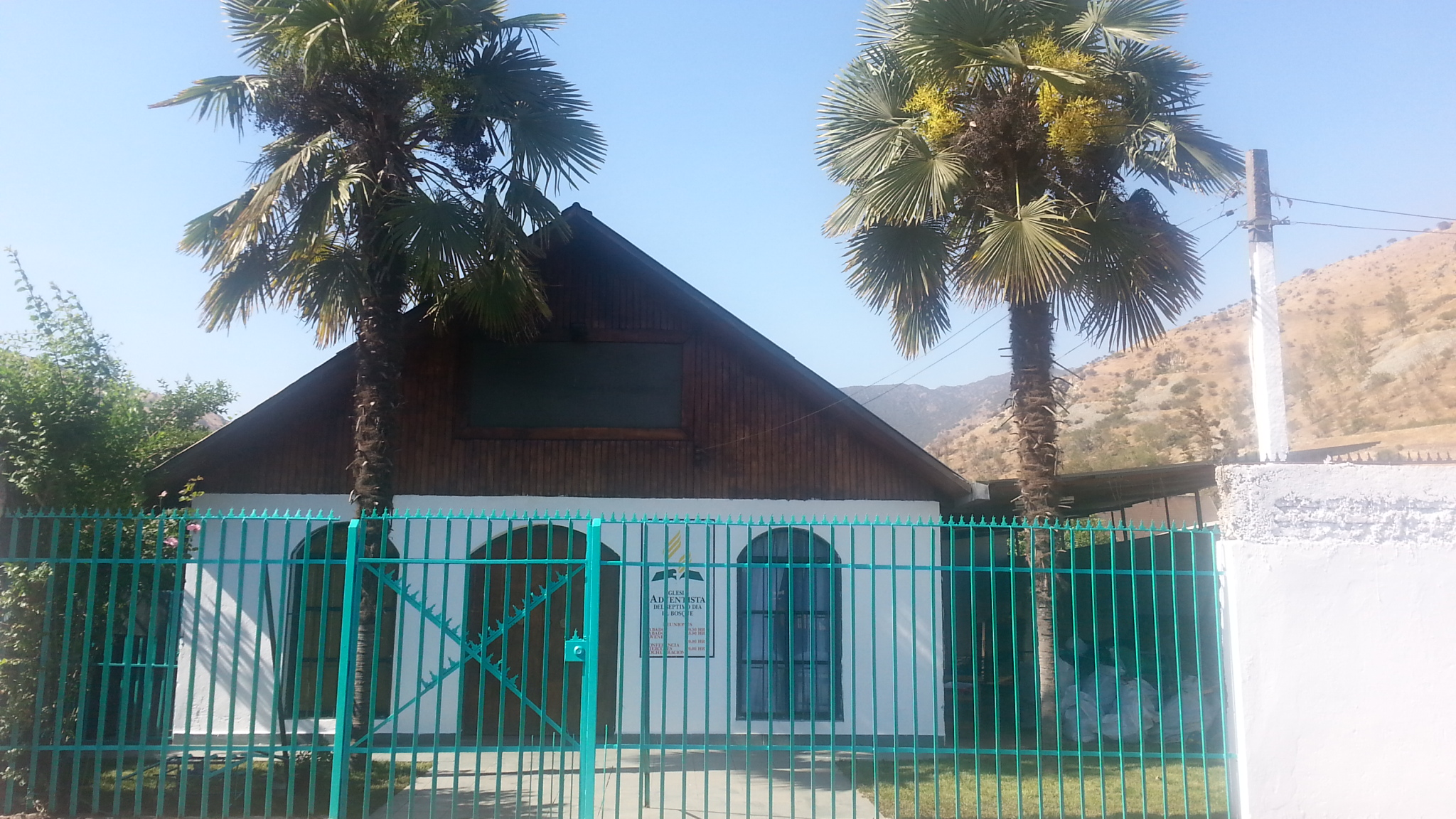 Iglesia El Bosque Republica de Guyana 467. Reuniones Sabado 9:30; 11:00: 18:00 y Miercoles 20:00